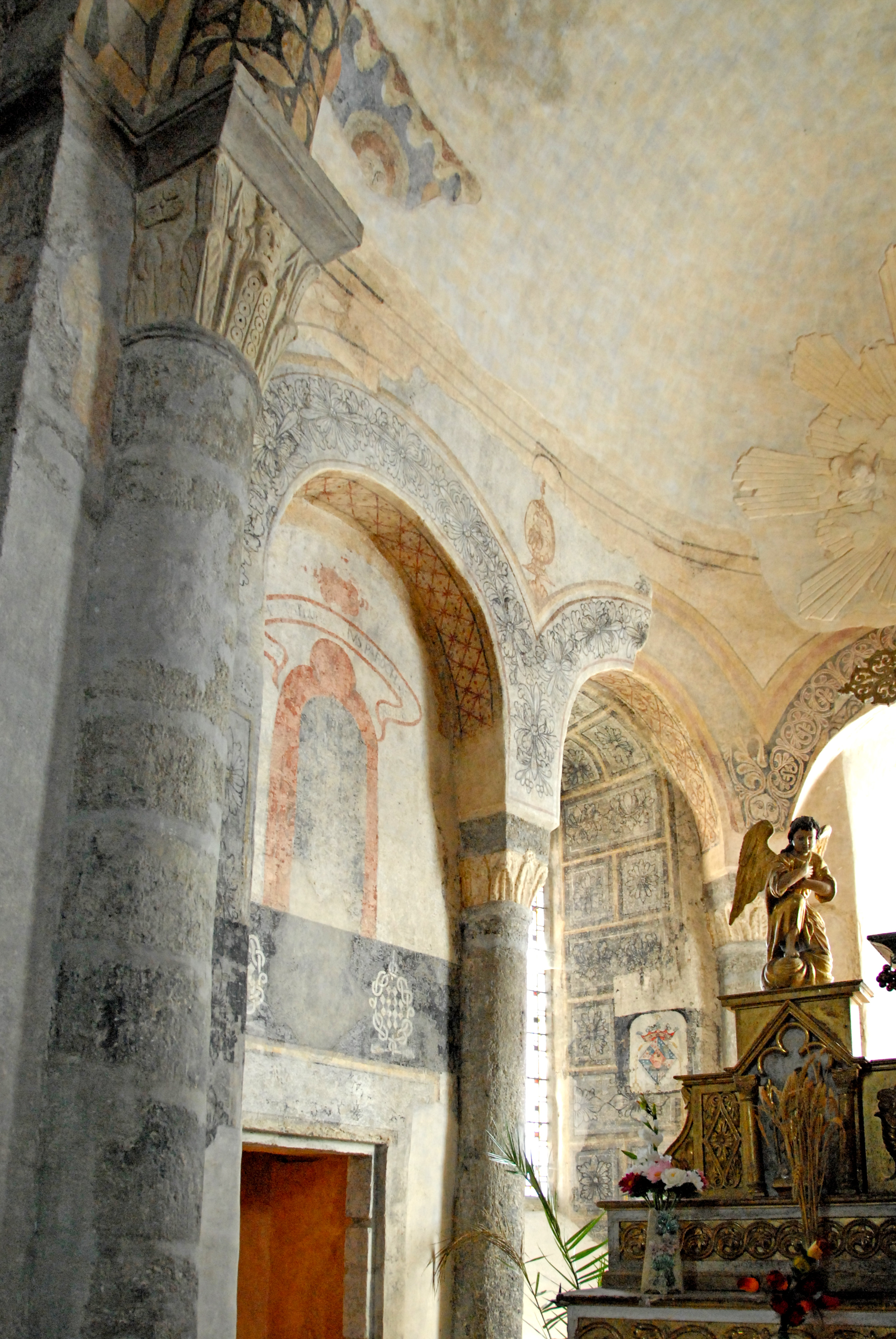 Abteikirche St.-André Lavaudieu, Chor Nordseite